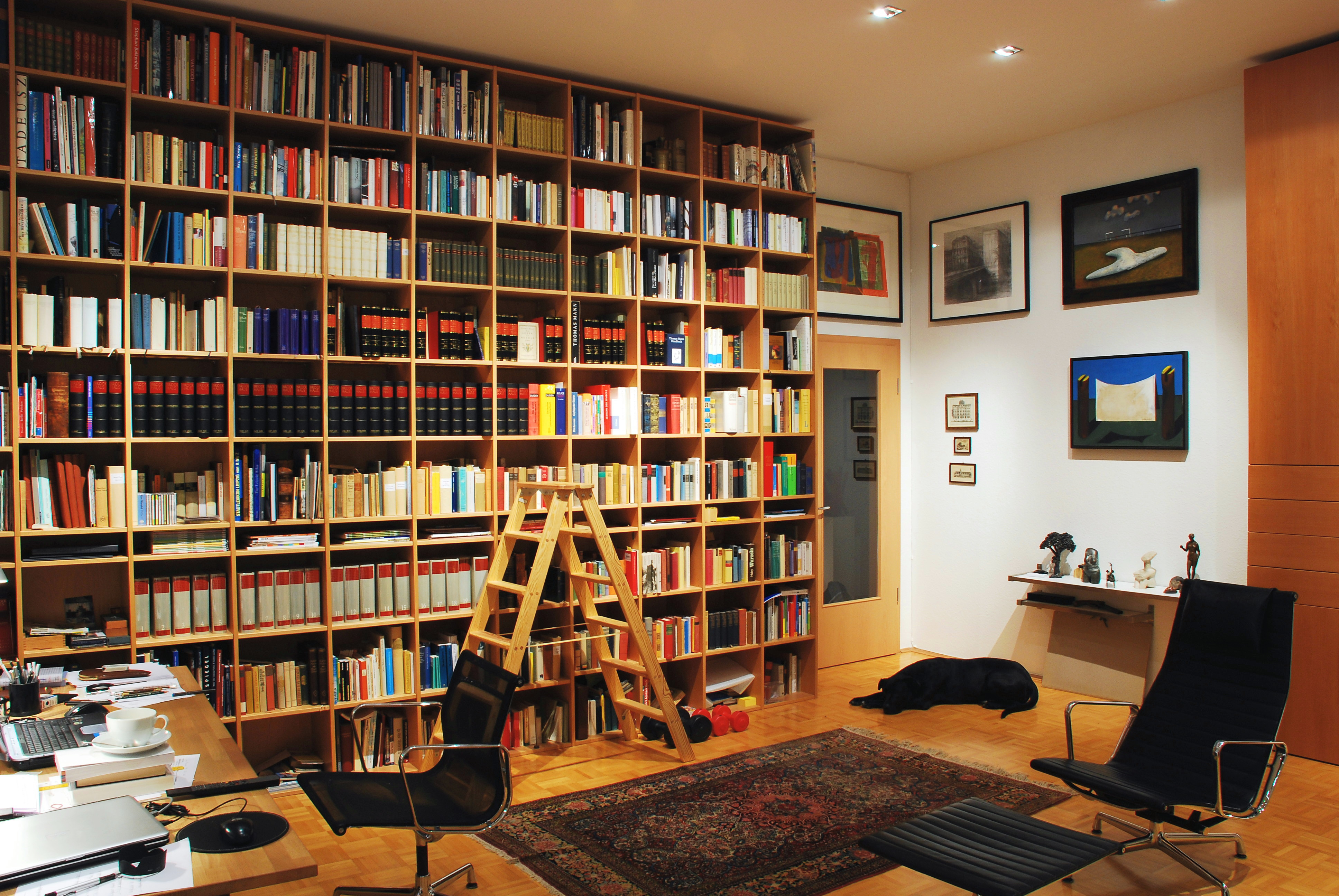 Antiquariat Dr. Haack Leipzig